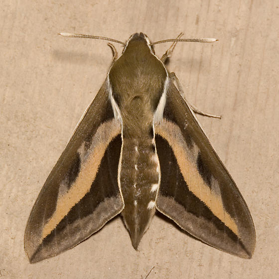 Hyles gallii